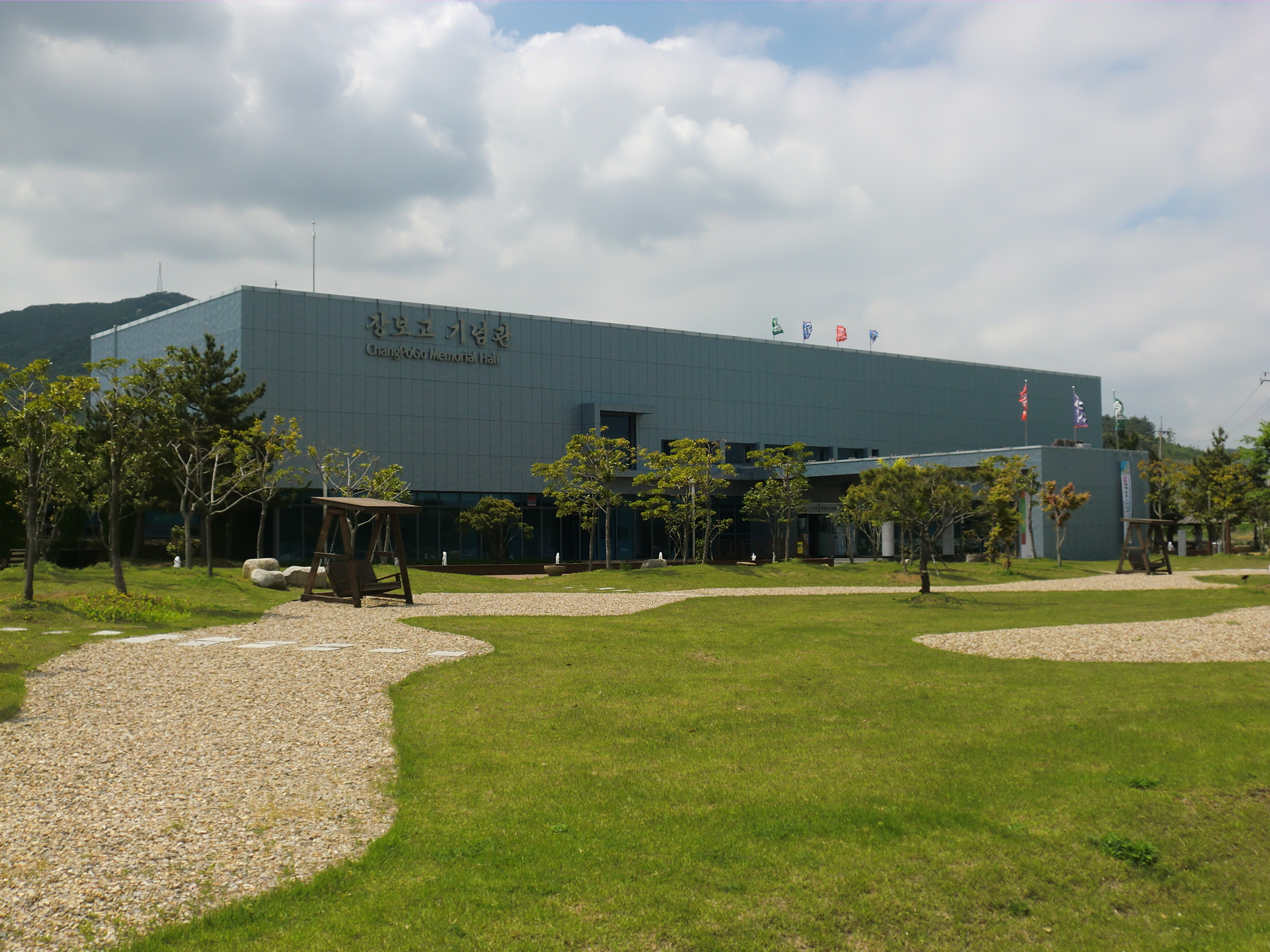 전라남도 완도군에 있는 장보고기념관